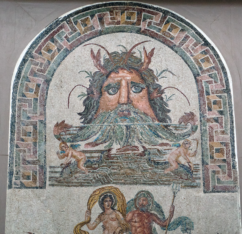 Muzeum Bardo. Mozaika rzymska. Okeanos.